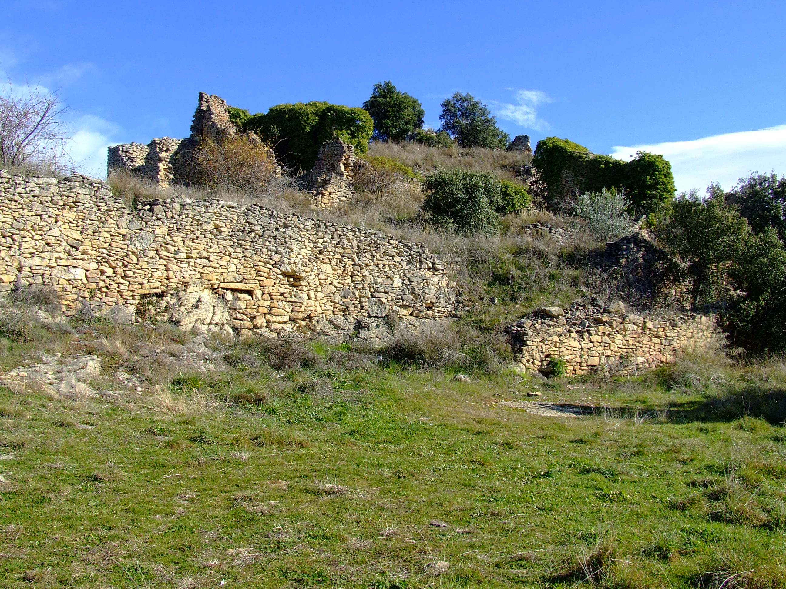 Les restes del poble vell de Biscarri (Benavent de la Conca, Isona i Conca Dellà, Pallars Jussà)